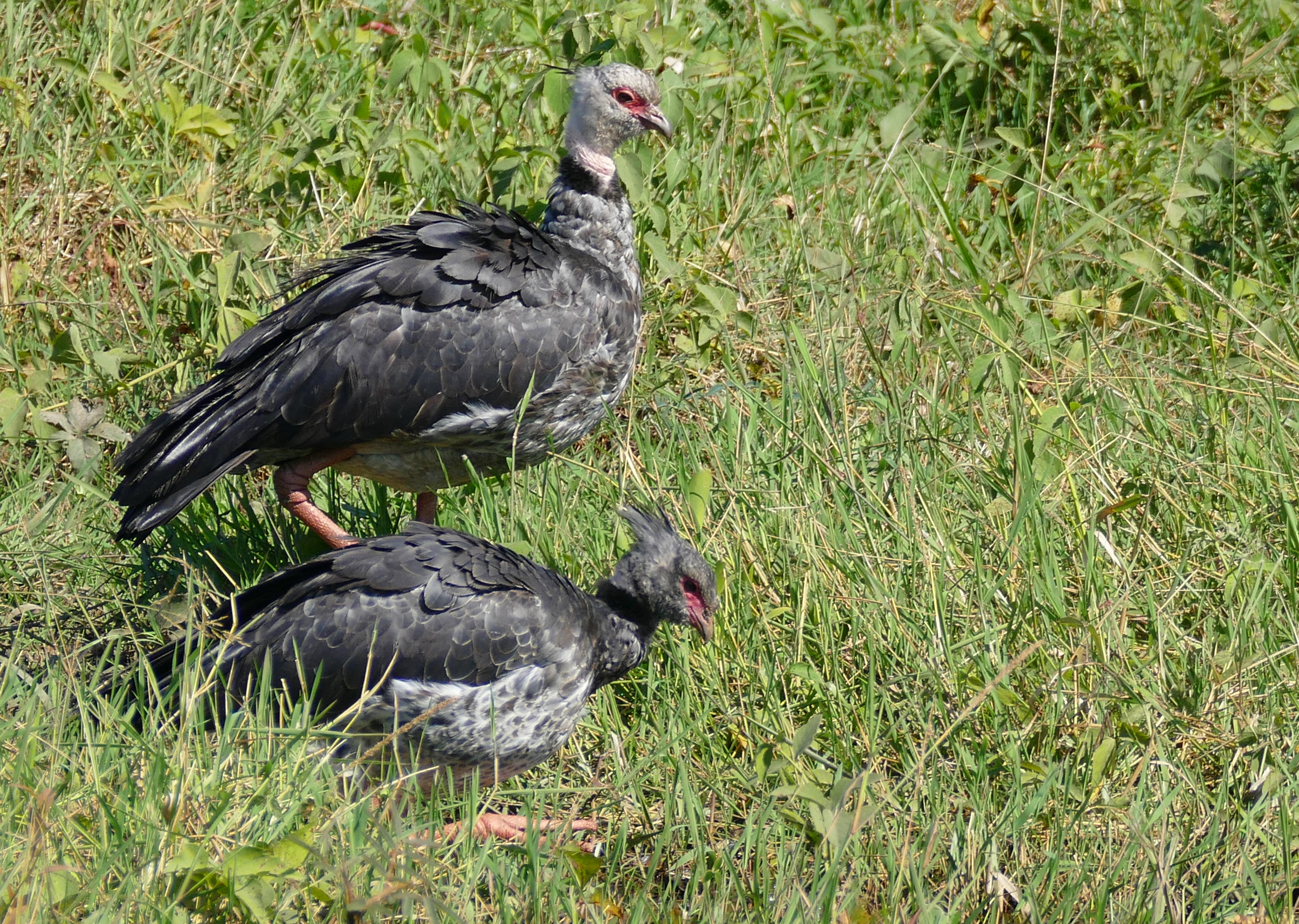 Campo Grande, Transpantaneira, Poconé, Mato Grosso, BRAZIL